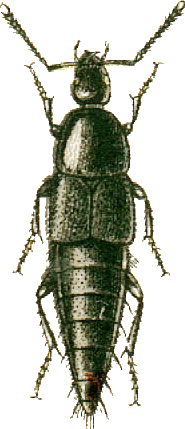 This file has been extracted from another file: Jacobs14.jpg